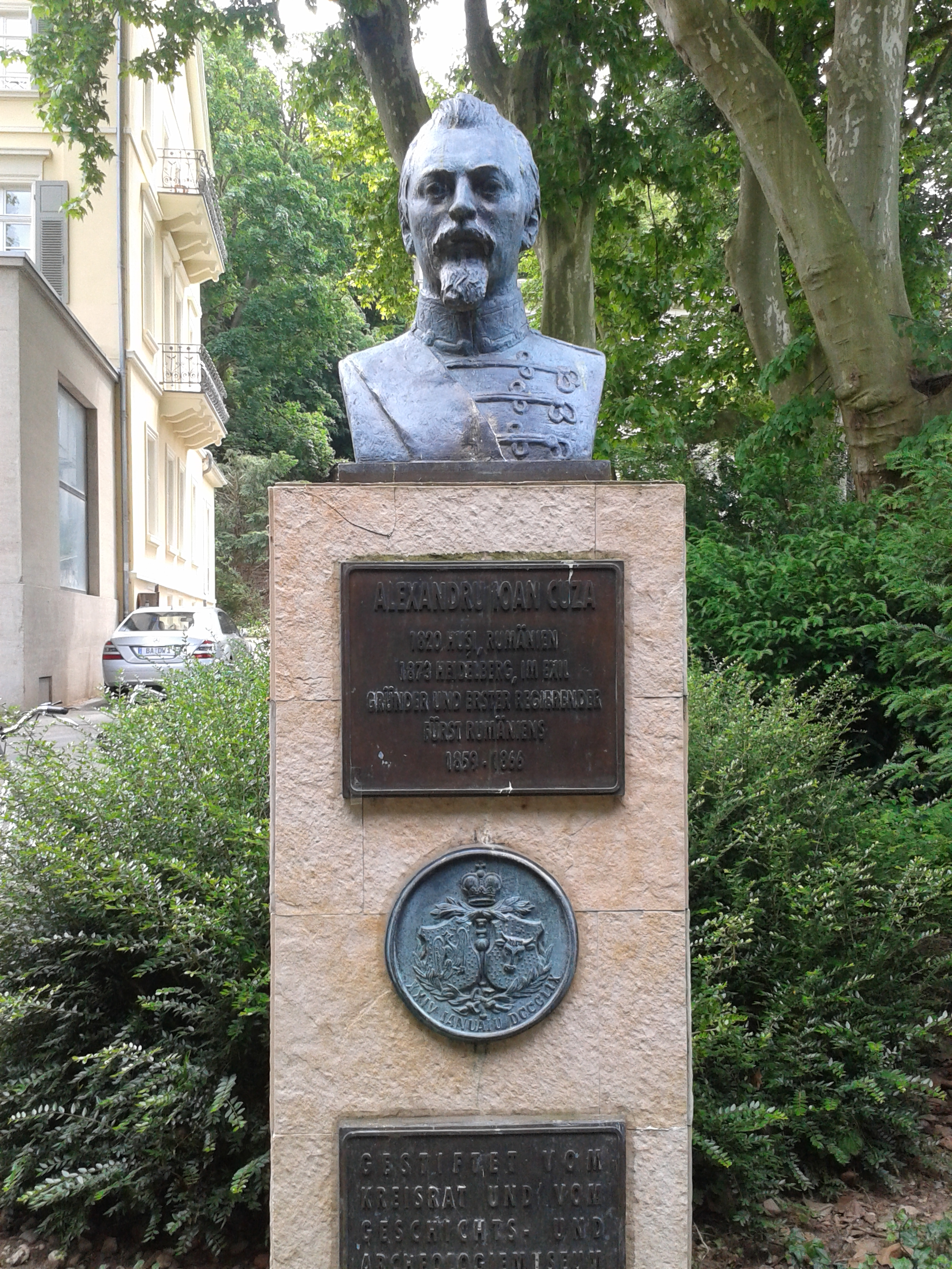 Statue von Alexandru Ioan Cuza im Stadtgarten Heidelberg vor dem Juristischen Seminar, Künstler: Constantin Ionescu